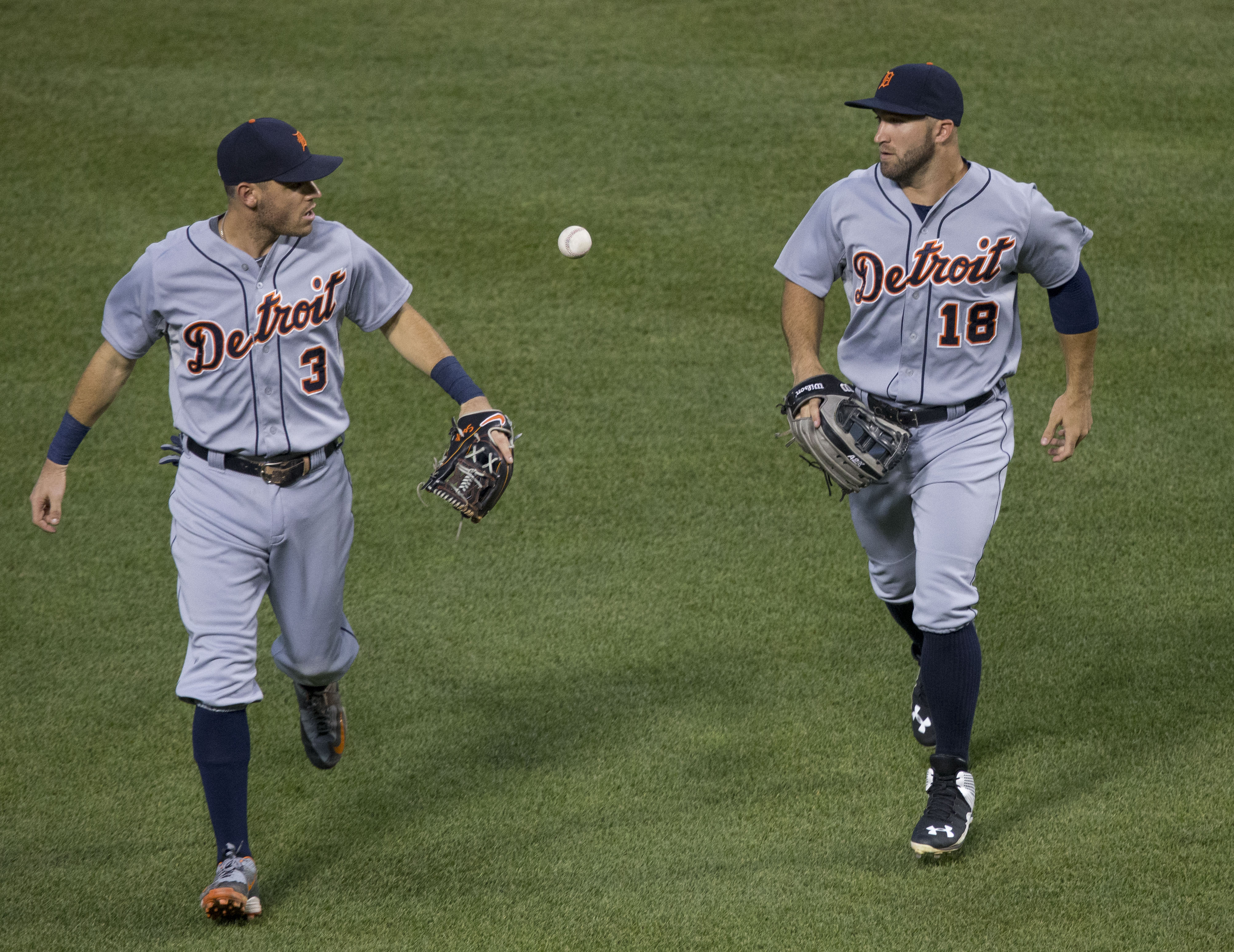 Tigers at Orioles 8/1/15